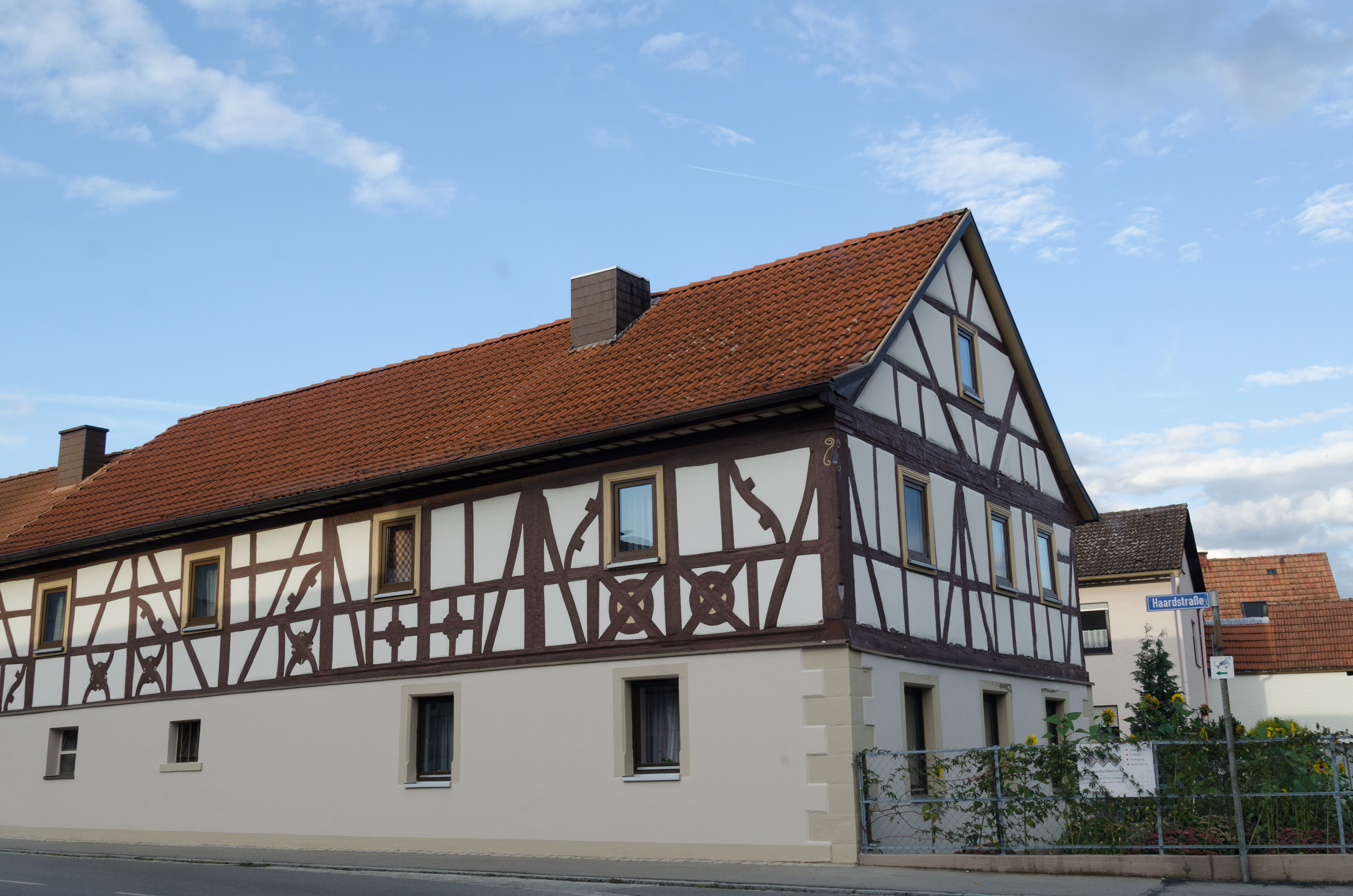 Nüdlingen, Henneberger Straße 1